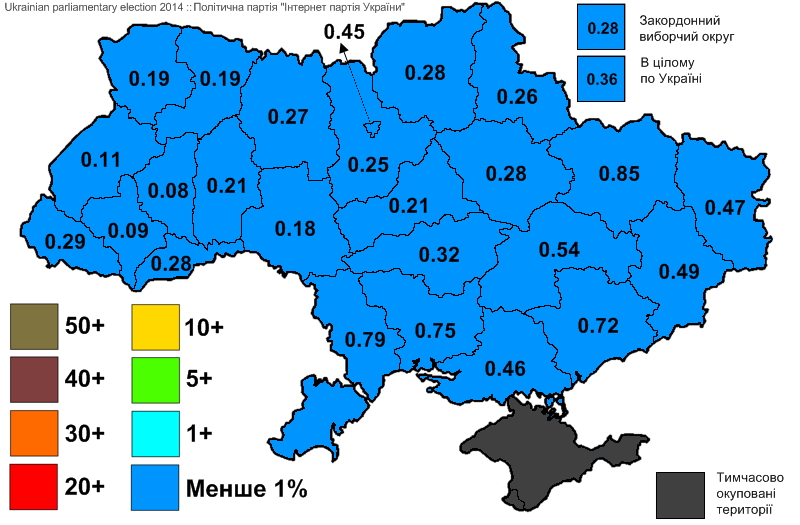 Результати виборів до Верховної Ради України, які відбулись 25 жовтня 2014 року. Інформація з офіційного сайту ЦВК. Політична партія "Інтернет партія України"